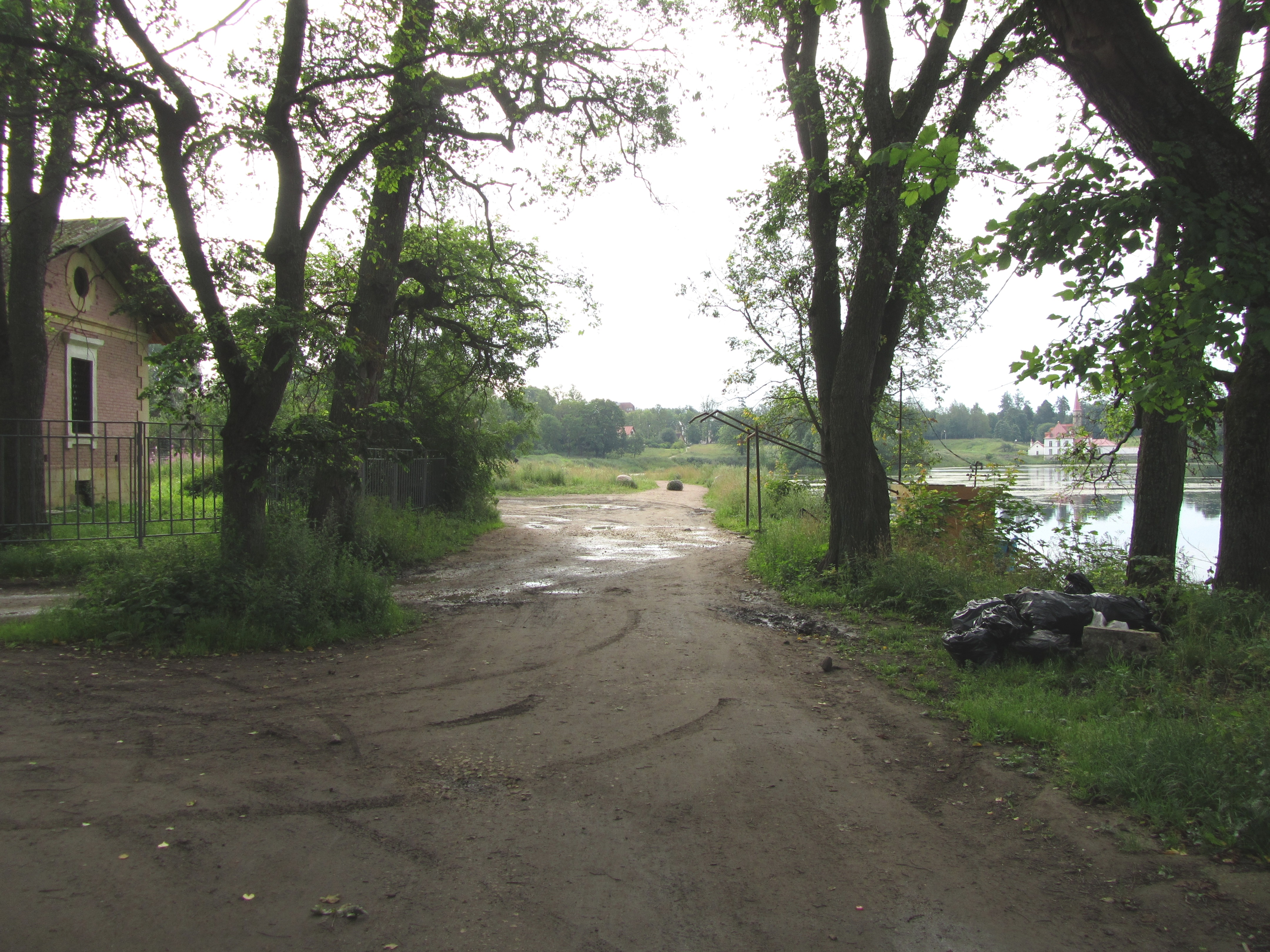 Здесь до середины 1990-х годов находились ворота.